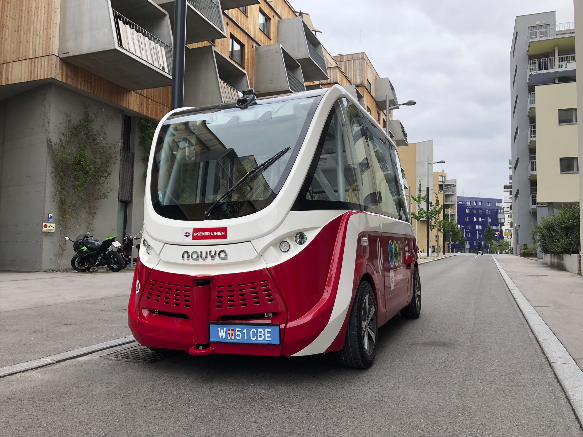 Navya teilautonomer Bus im Testbetrieb in der Wiener Seestadt Aspern